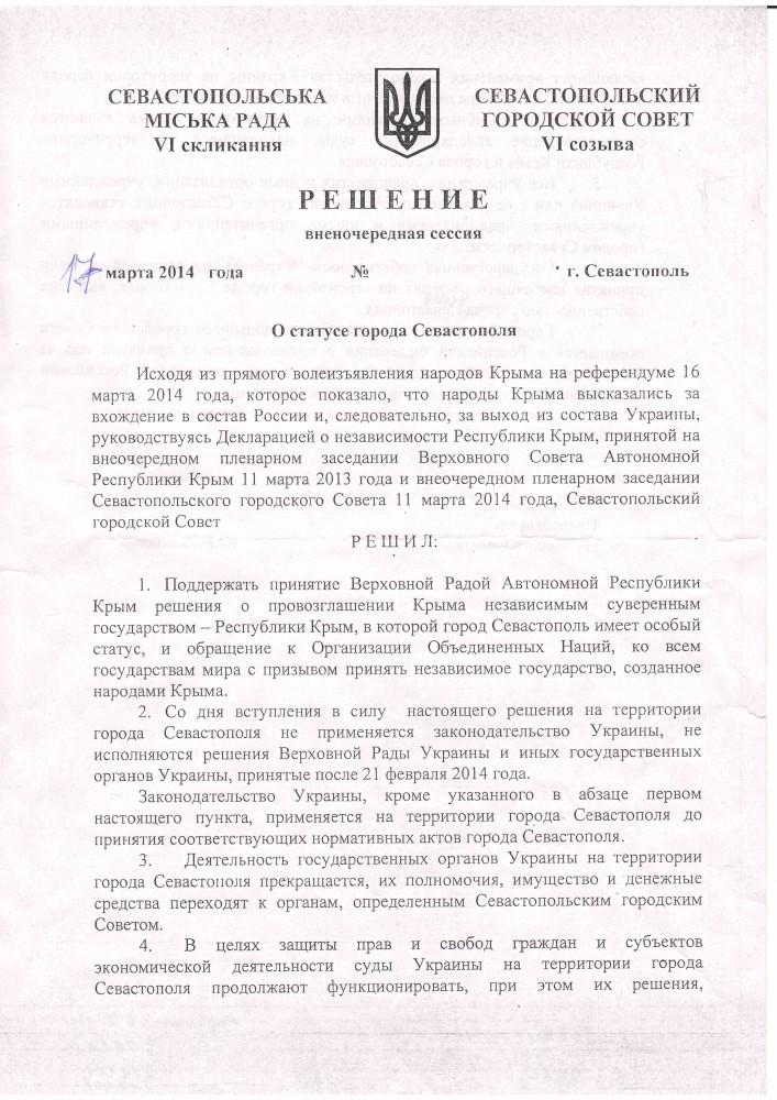 Решение горсовета Севастополя "О статусе города Севастополя" от 17 марта 2014 - "Деятельность государственных органов Украины на территории Севастополя прекращается..." Стр.1.